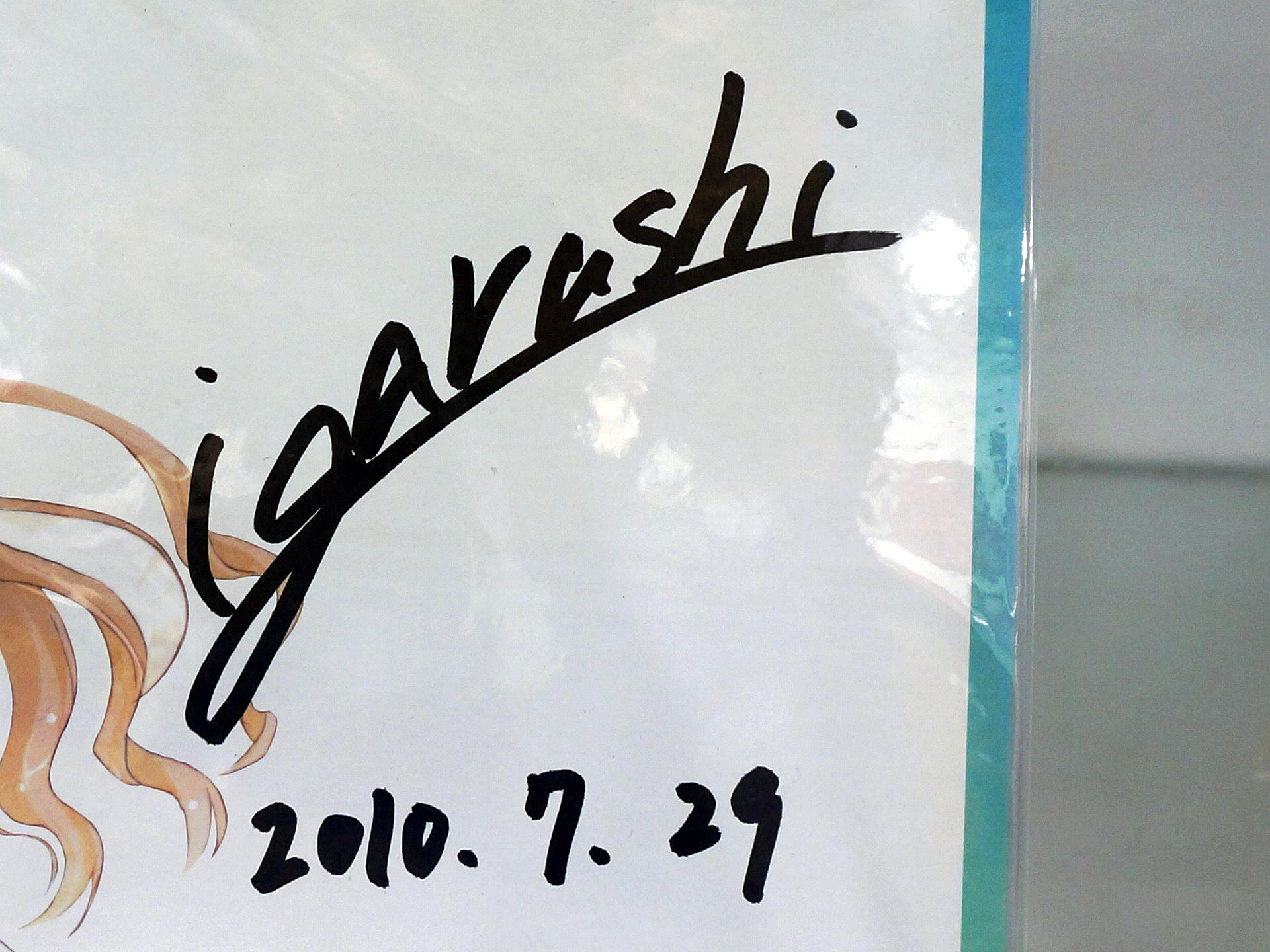 第20屆漫畫博覽會，「漫畫博覽會歷屆名師簽繪手稿展」展示的《乃木坂春香的秘密》作者五十嵐雄策簽名板。